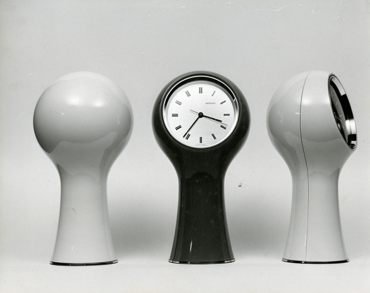 Angelo Mangiarotti e Bruno Morassutti, "Secticon C-1 e C-2", 1960, orologi da tavolo, per l'azienda Le Porte-Échappement Universel S.A. Servizio fotografico : Milano, 1961 / Paolo Monti. - Stampe: 4 : Positivo b/n, gelatina bromuro d'argento/ carta, 18x24. - ((Al verso delle stampe manoscritti (a matita) i numeri dei negativi corrispondenti secondo altra numerazione?. 162, 163, 166, 167 e impressi a inchiostro: 48162, 48166 (risalenti all'attività dello Studio 22); iscrizioni didascaliche manoscritte a penna: "Fiumi"; timbri a inchiostro con copyright (tra cui Foto Studio 22 - Corso Sempione - Milano). - Sul coperchio della scatola iscrizione didascalica manoscritta a pennarello nero: "Umbria".